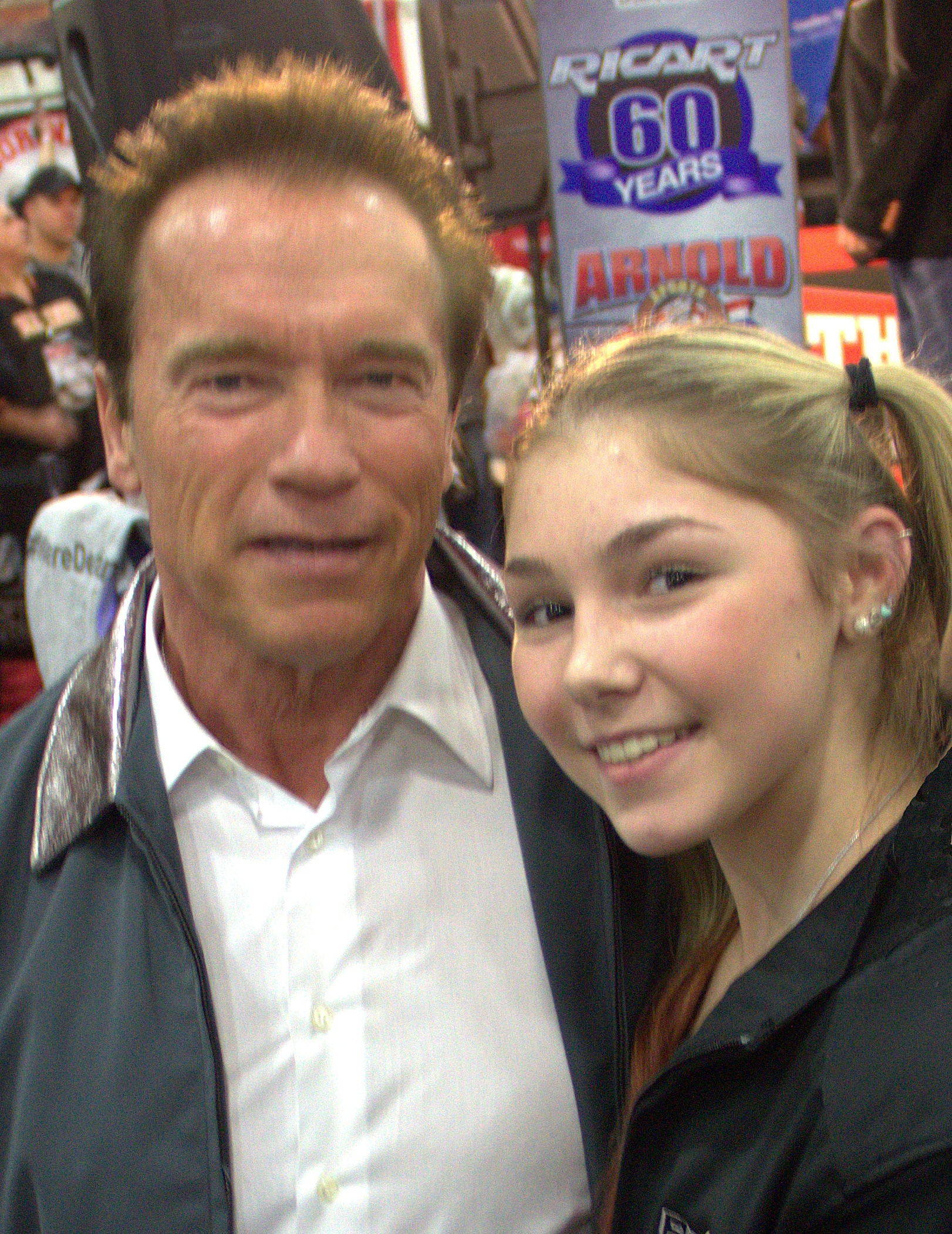 Марьяна Наумова, чемпионка Мира 2011-2012, Абсолютная рекордсменка Мира в жиме штанги лежа среди девушек-тинейджеров, первая девушка до 18 лет, выполнившая норматив Элита России в жиме штанги лежа и попавшая на обложку крупнейшего в Мире журнала по пауэрлифтингу "Powerlifting USA". На фото - Марьяна Наумова и легендарный спортсмен, актер и экс-губернатор Калифорнии Арнольд Шварценеггер. ФОто сделано на крупнейшем мультифестивале "Арнольд Классик 2013" в Колумбусе, США.